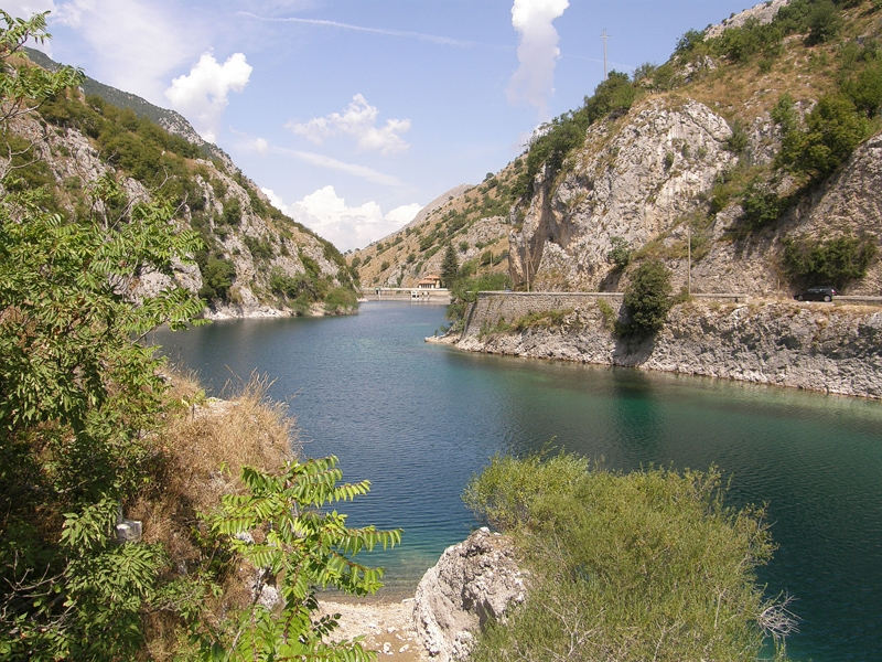 Lago di San Domenico 2009